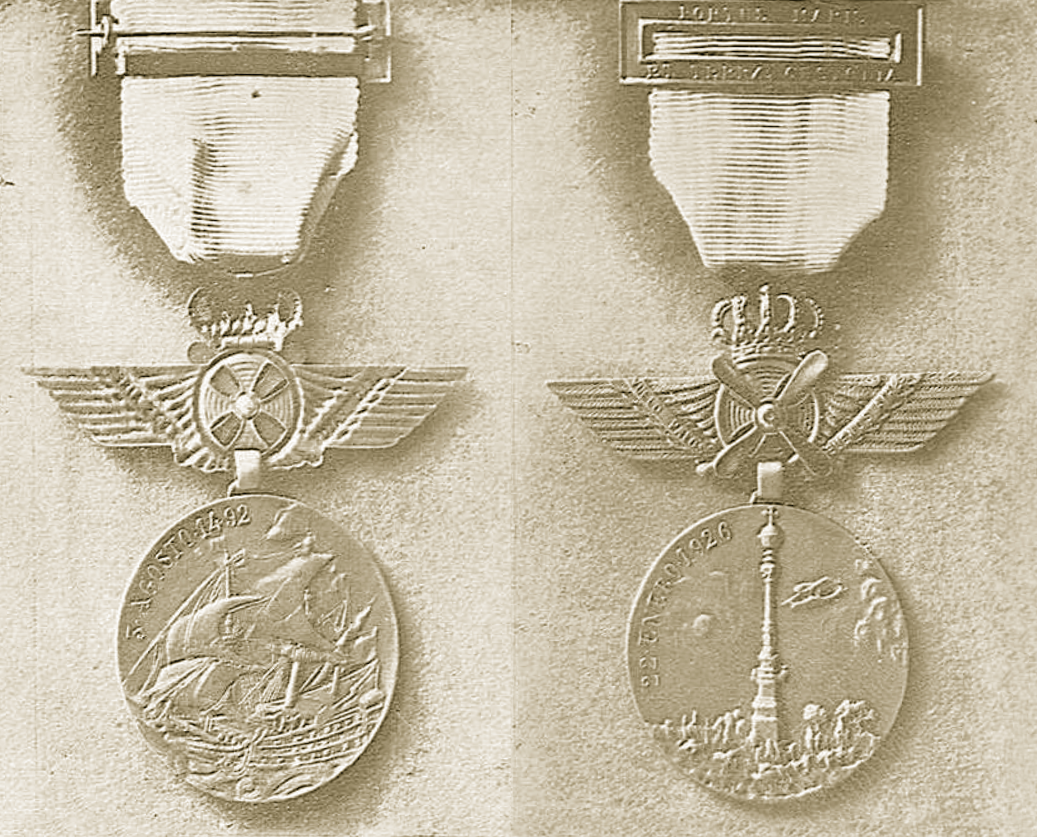 Medallas ayuntamiento huelva plus ultra 1926